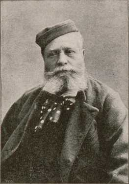 Carte postale du Salon d'art de la Revue alsacienne illustrée. Exposition L. Schuetzenberger; Salon d'Art de la Revue Alsacienne illustrée Strasbourg; NBI 1 IMAGE CONSULTABLE SUR VIDEODISQUE - SALLE DU PATRIMOINE PORTRAIT, Schutzenberger (Louis-Frédéric), 14,1 x 9,3 cm